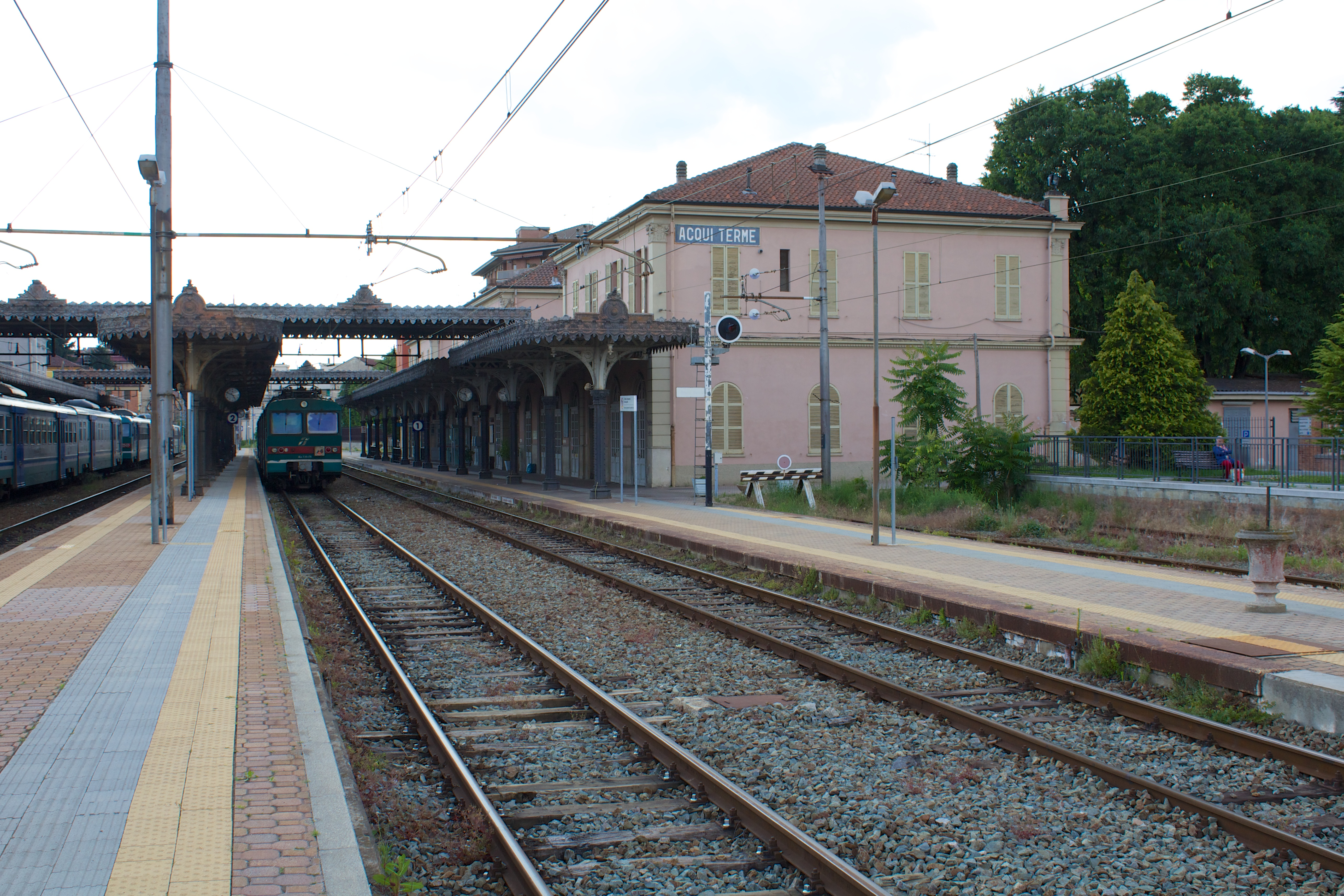 Stazione di Acqui Terme, Alessandria